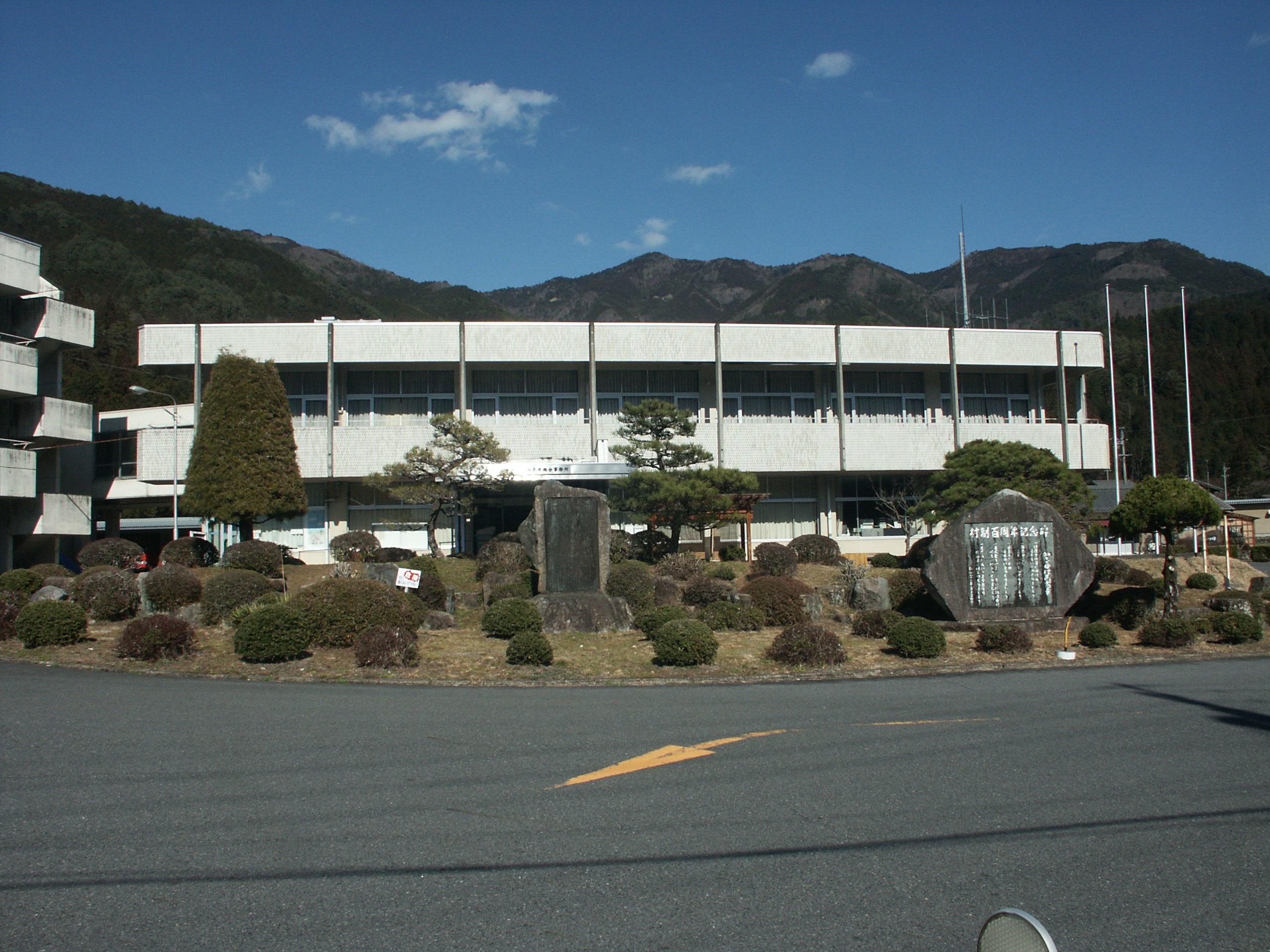 中津川市役所加子母総合事務所庁舎（旧加子母村役場）